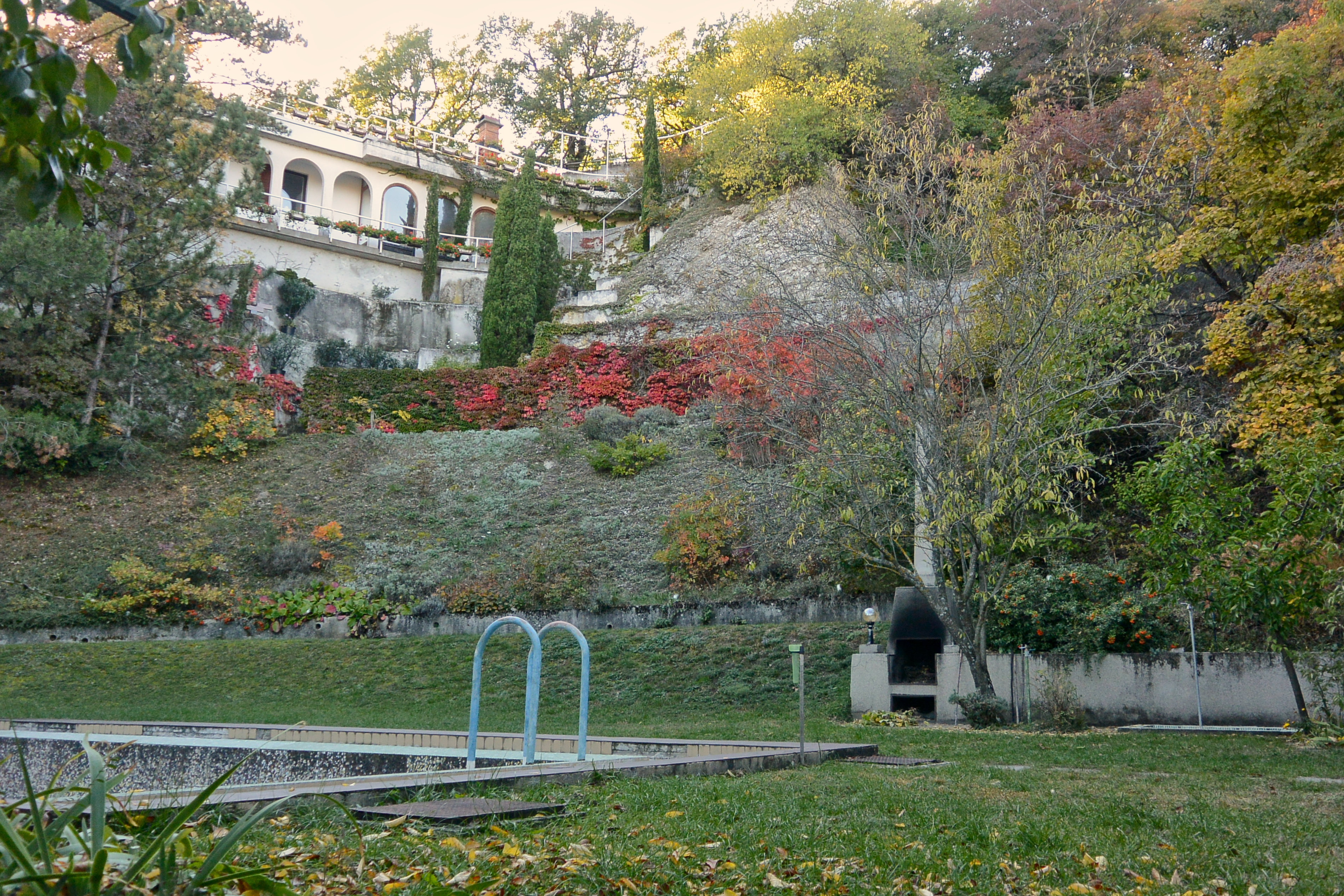 Mőcsényi Mihály bányaudvarból kialakított balatongyöröki nyaralója